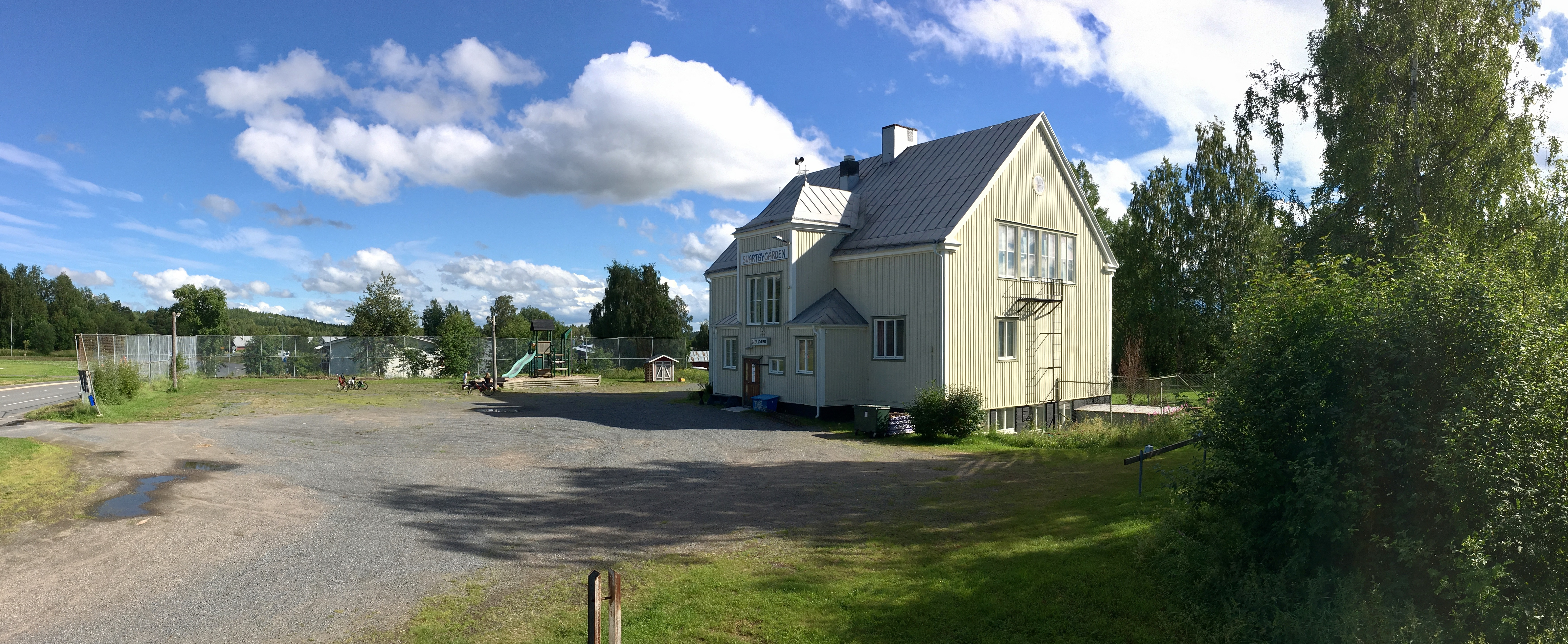 Svartbygården i Stadsdelen Södra Svartbyn några kilometer utanför Bodens centrum, sommaren 2016.